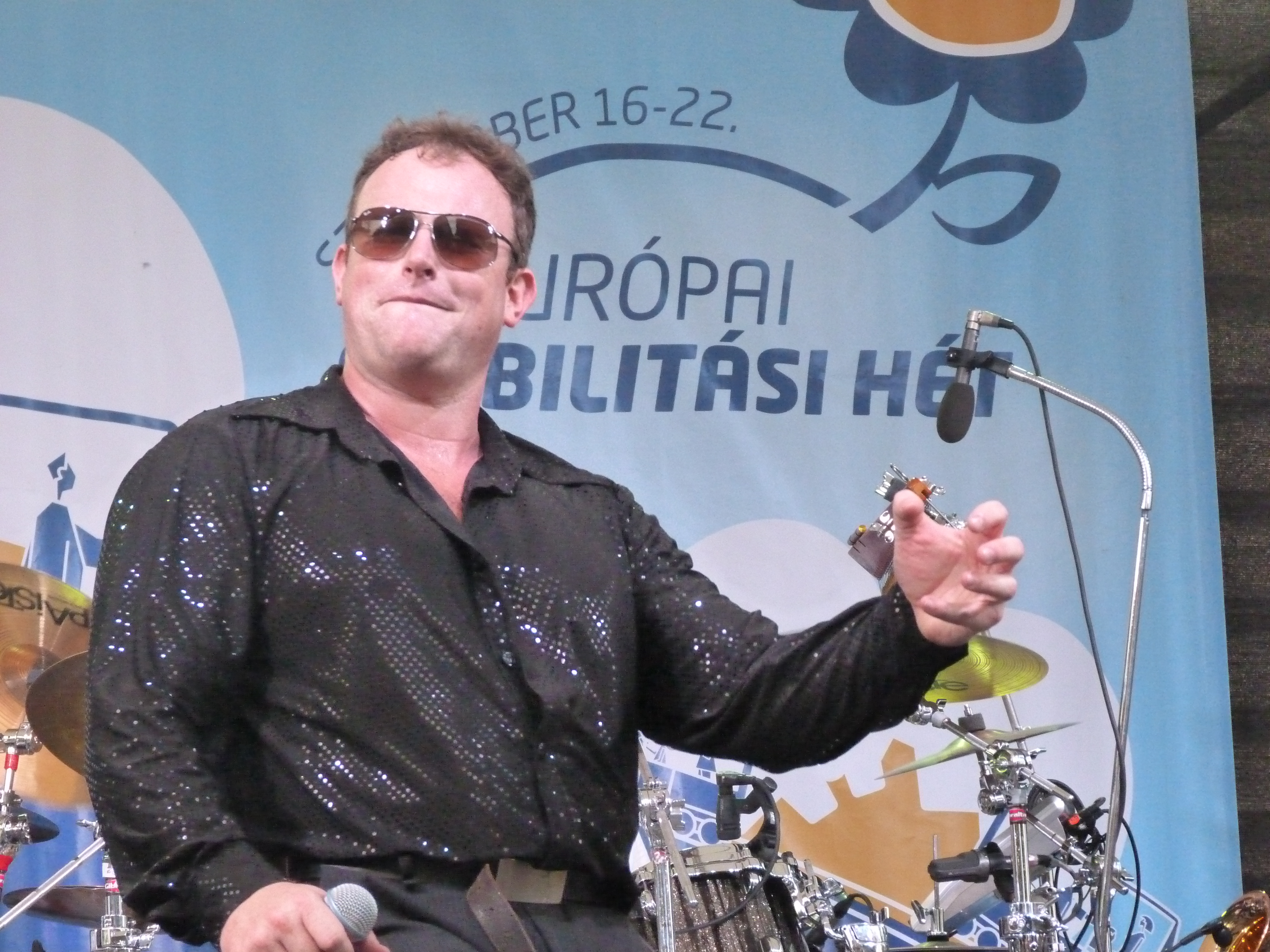 A felvétel 2014. szeptember 21-én vasárnap készült Budapesten, az Andrássy úton. Autómentes Nap. ©© Derzsi Elekes Andor, Budapest, 2014, A kép egészben, vagy részletekben másolását, bármilyen úton történő sokszorosítását és felhasználását a szerző ellenérték nélkül, jogutódjaira is kihatóan megengedi. Az engedély kiterjed a kereskedelmi célú hasznosításra is. Kéri azonban nevének feltüntetését a felhasználás során. A Metapolisz sorozat valamennyi képe és filmje Creative Commons alatti valamint kereskedelmi - for profit - célra is felhasználható. Ajánlott hivatkozás: Derzsi Elekes Andor: Metapolisz DVD line